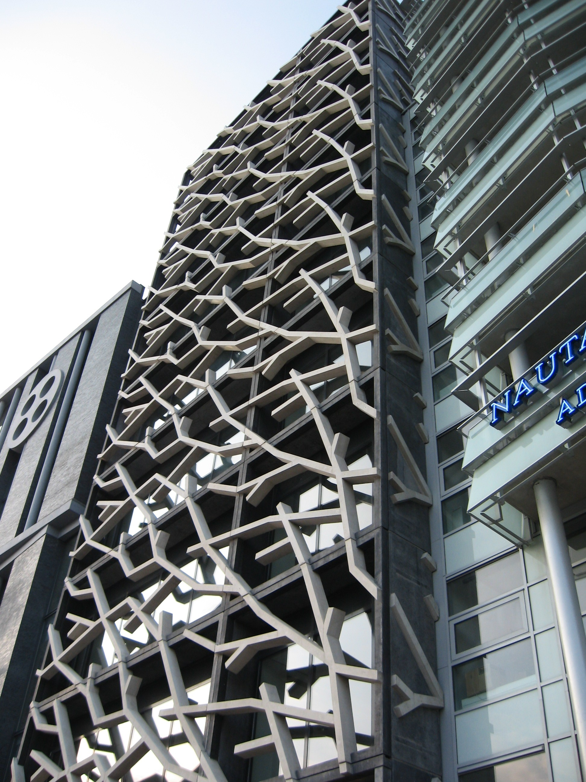 Dominor van Van Zuuk